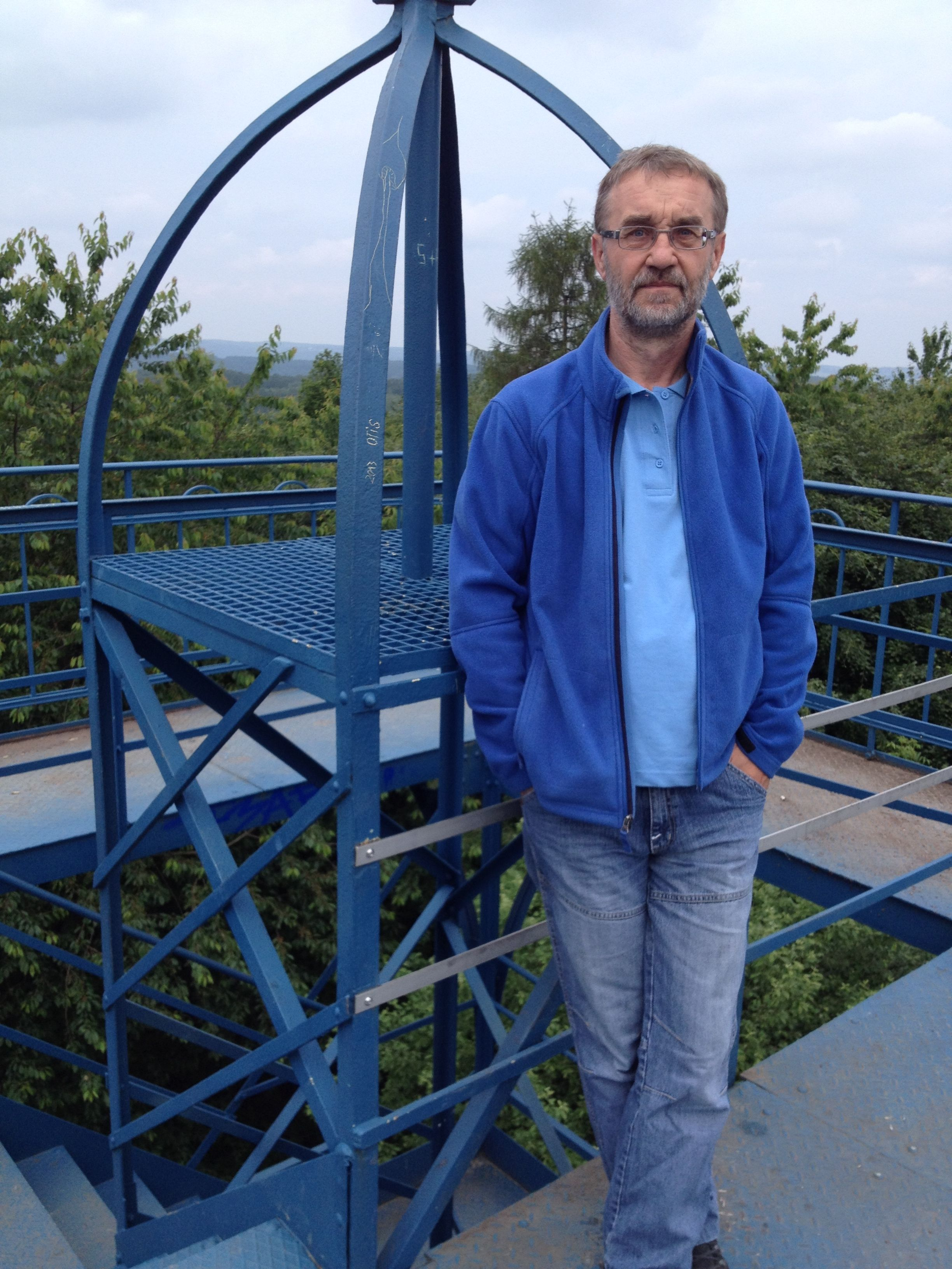 Walter Wehner, Autor von Kriminalromanen Depicted person: Walter Wehner – German author